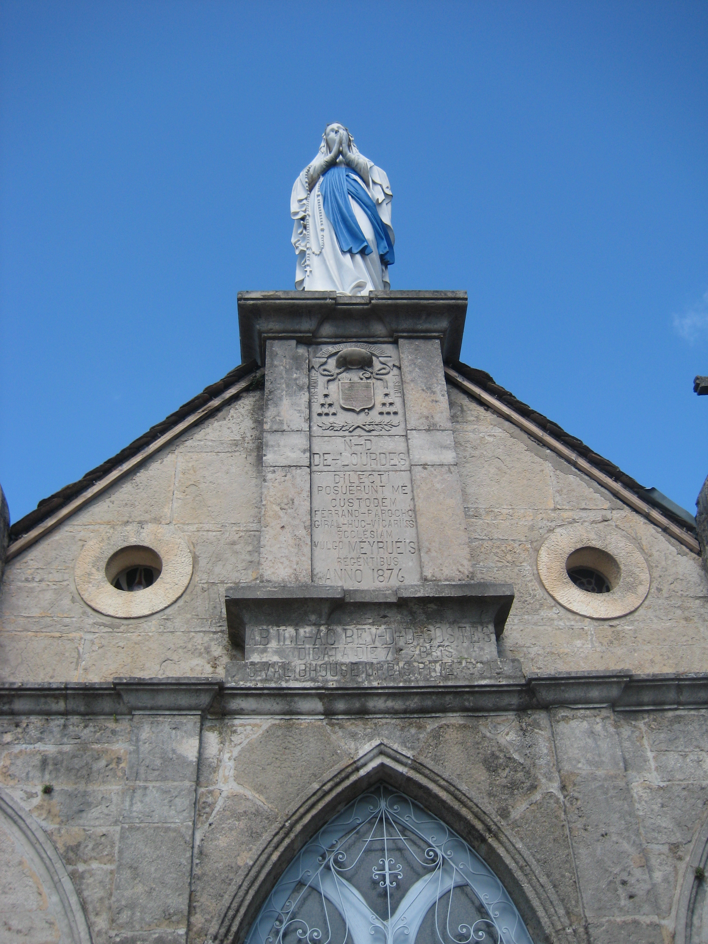 Statue de Notre-Dame du Rocher à Meyrueis (Lozère)